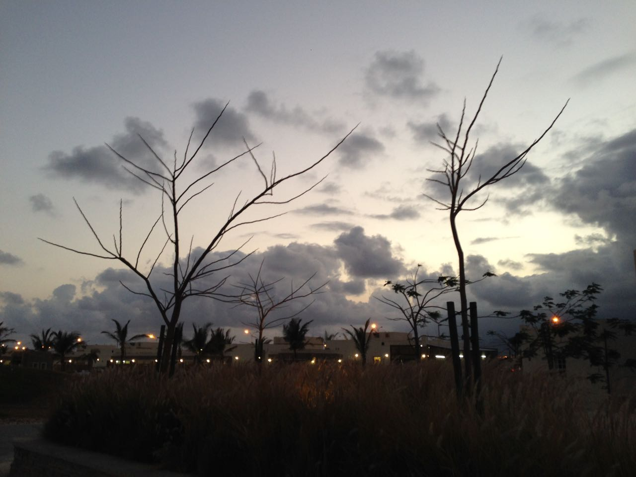 أتين في المساء